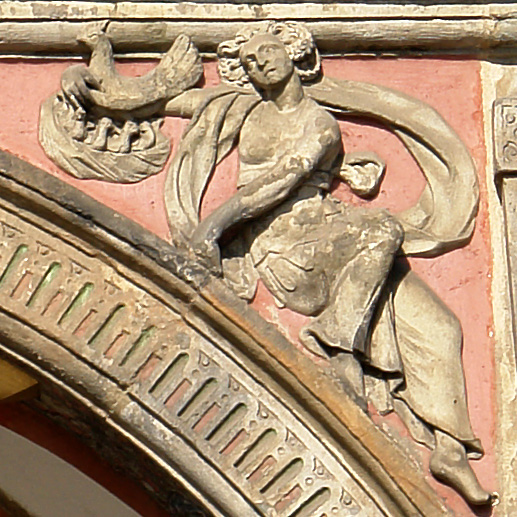 Rathaus in Bremen. Zwickelrelief im zweiten Arkadenbogen: Custodia (Gluckhenne)